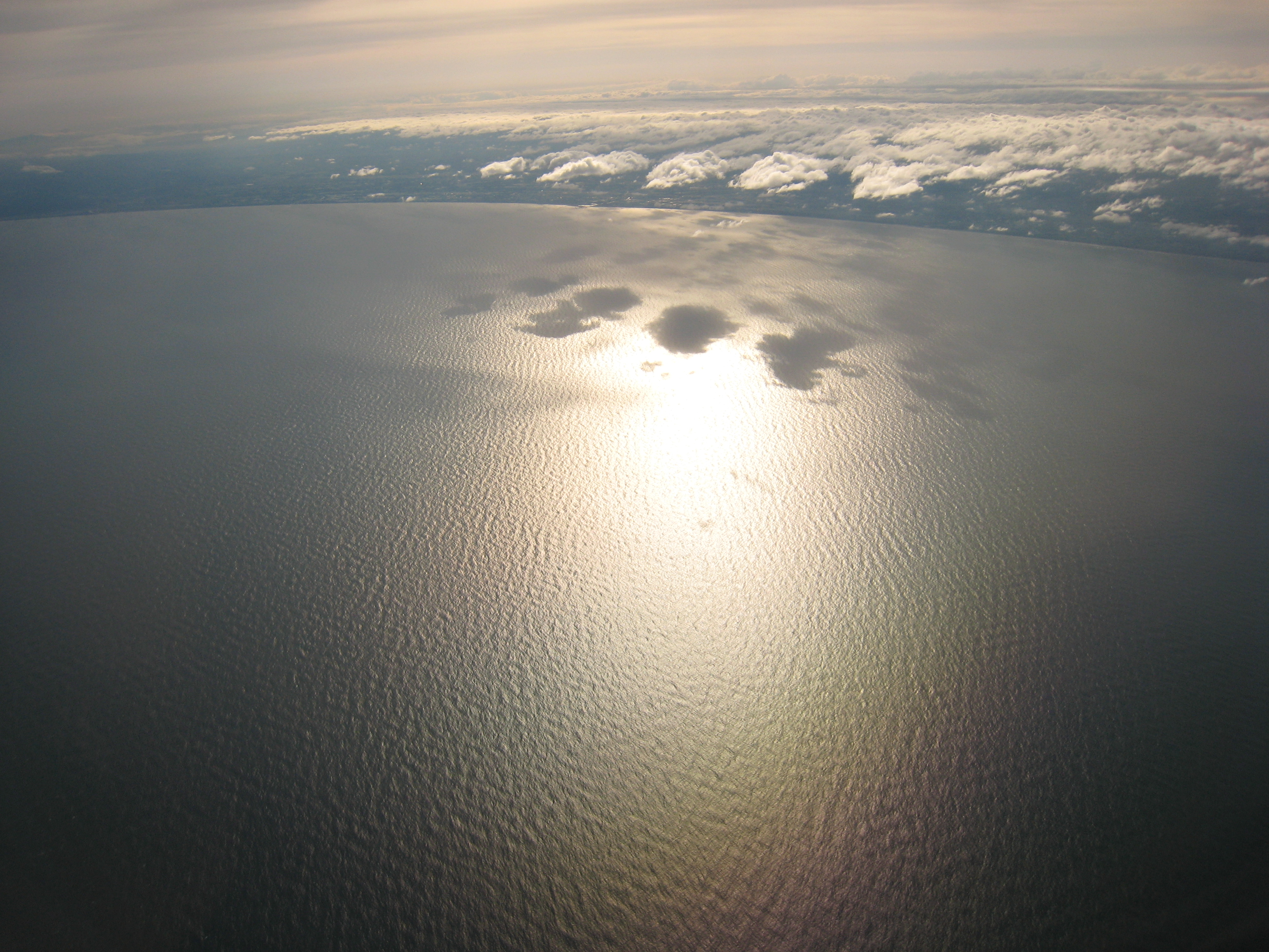 Kujukuri beach(九十九里浜), Chiba(Japan) from Airplane(航空写真)